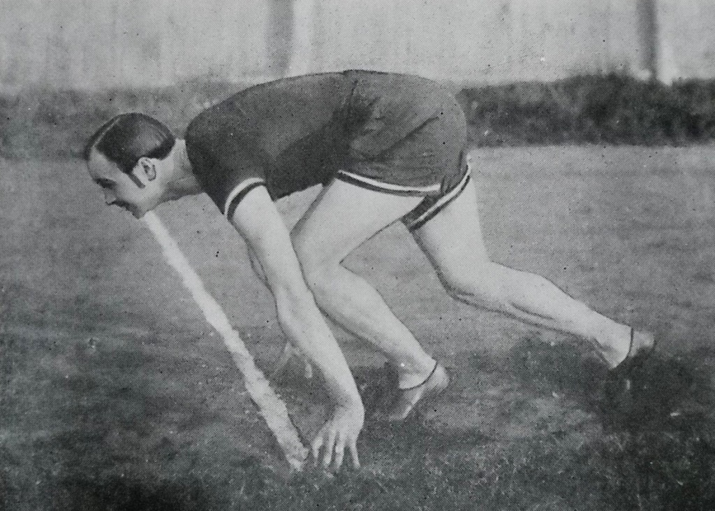 Vilmos Rácz, Hungarian athlete